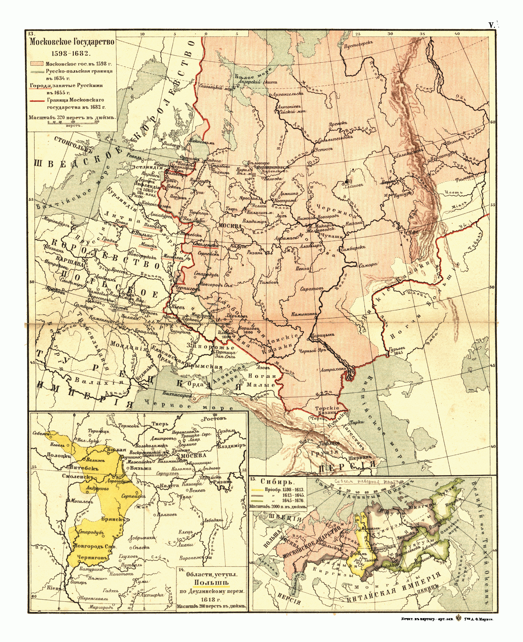 Карта Московского Государства в 1598-1682 годах